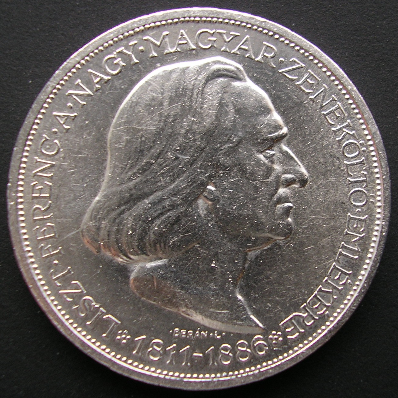 Hungary 2 Pengő Liszt Ferenc 1936